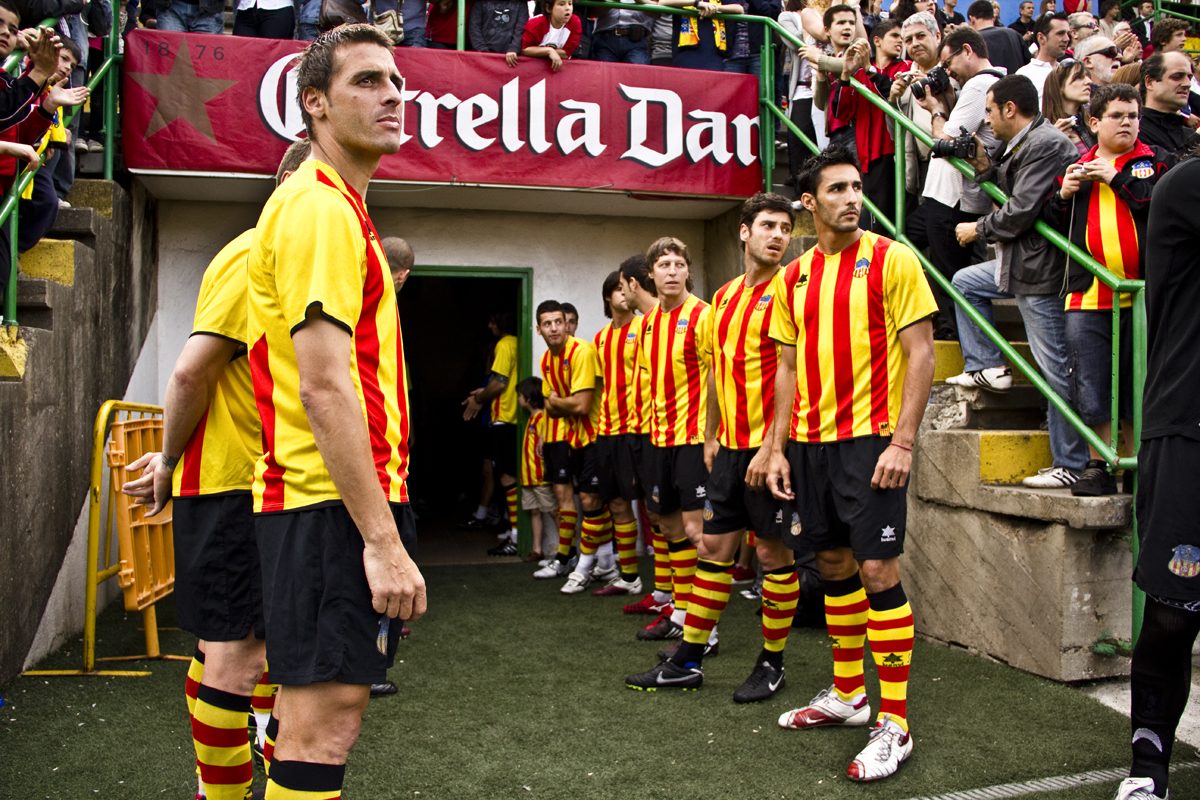 Unio Esportiva Sant Andreu 2009/10